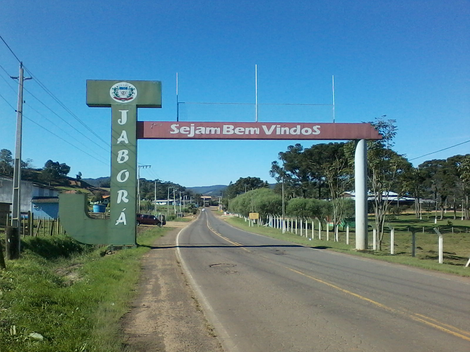 Pórtico de acesso a Jaborá, sentido Concórdia-Joaçaba, em 21 de junho de 2014